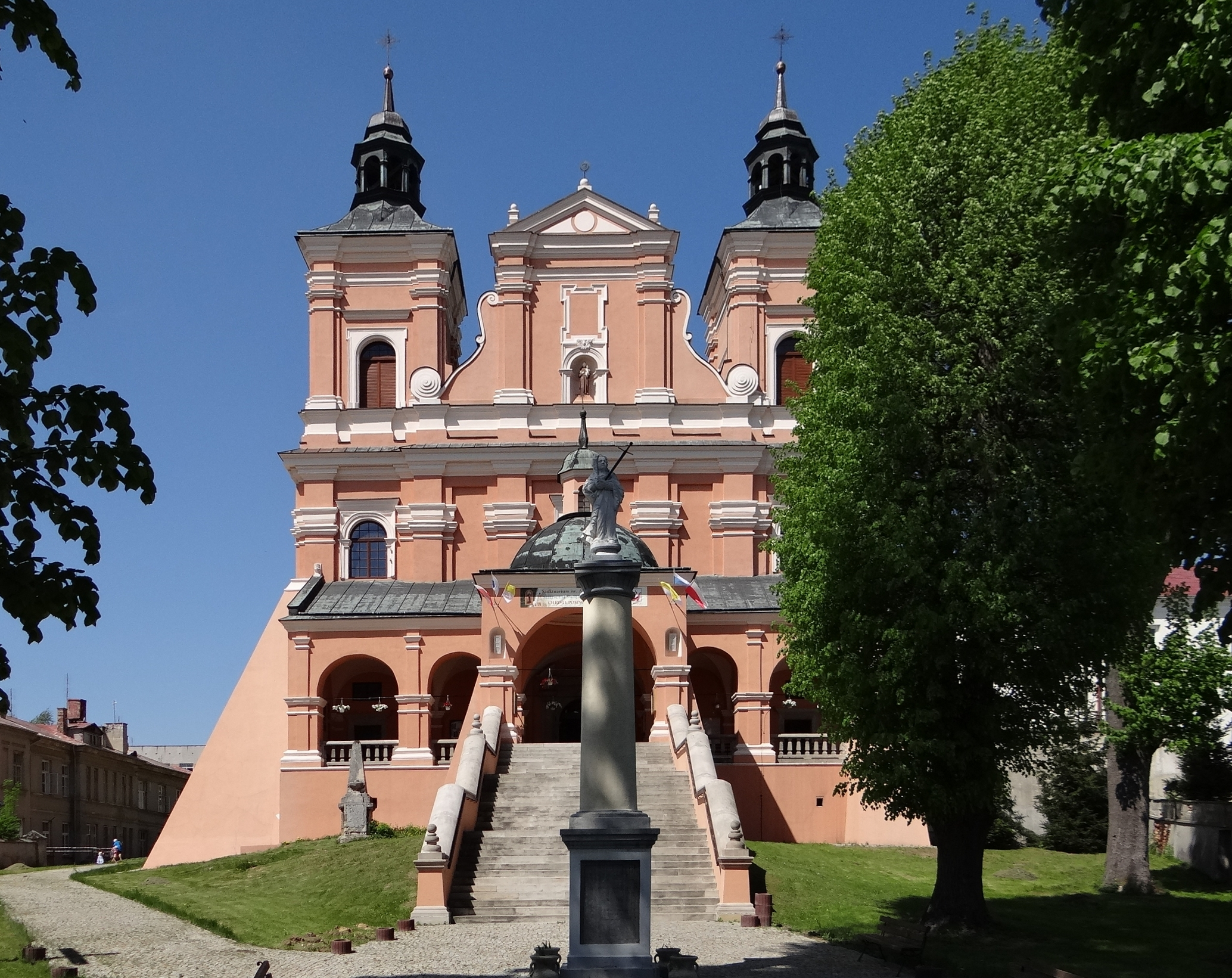 Klasztor oo. Bernardynów.